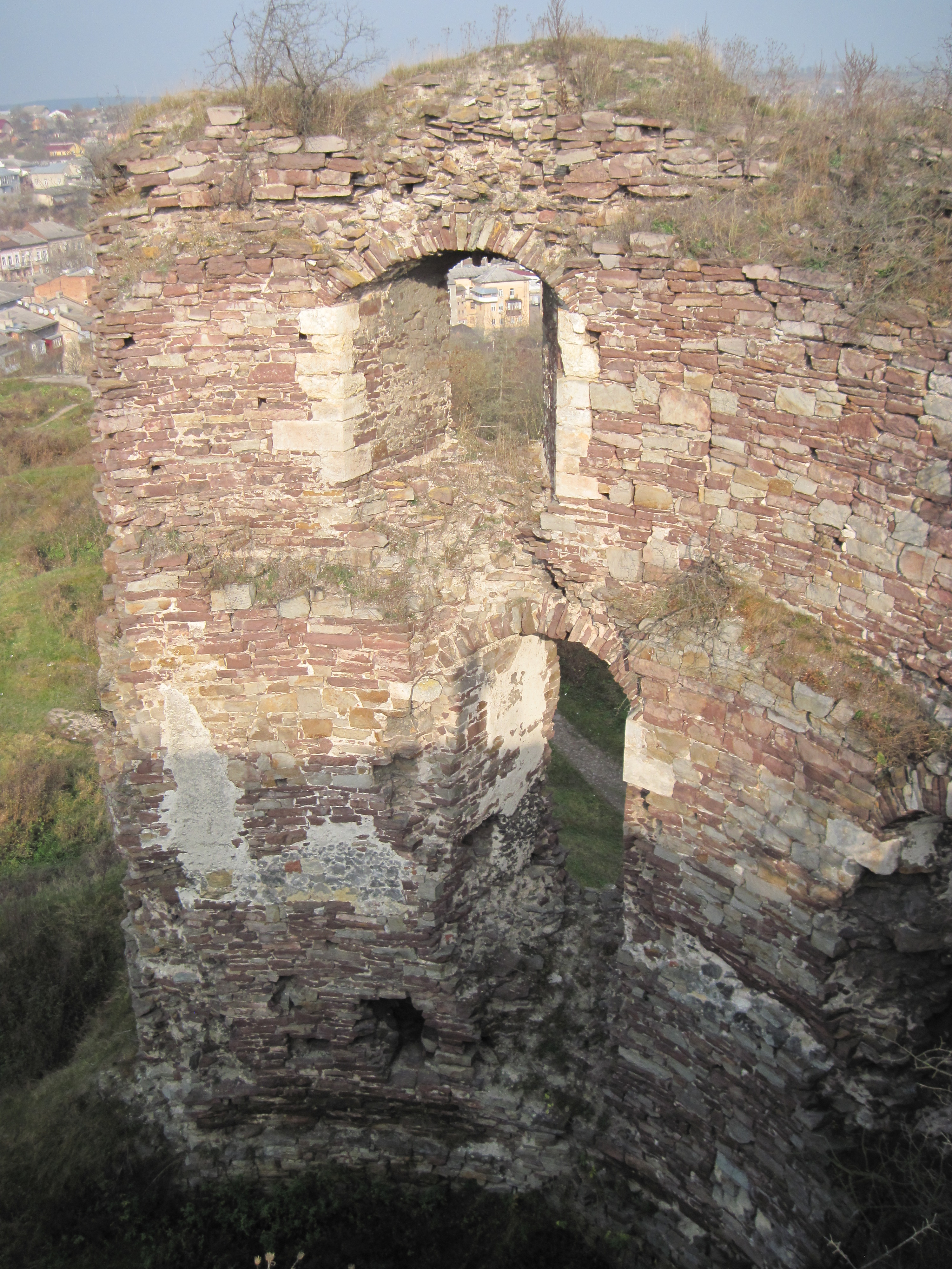 Вежа, інтер'єр, осінь 2013